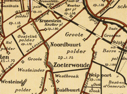 Grote_Polder_(Zoeterwoude)